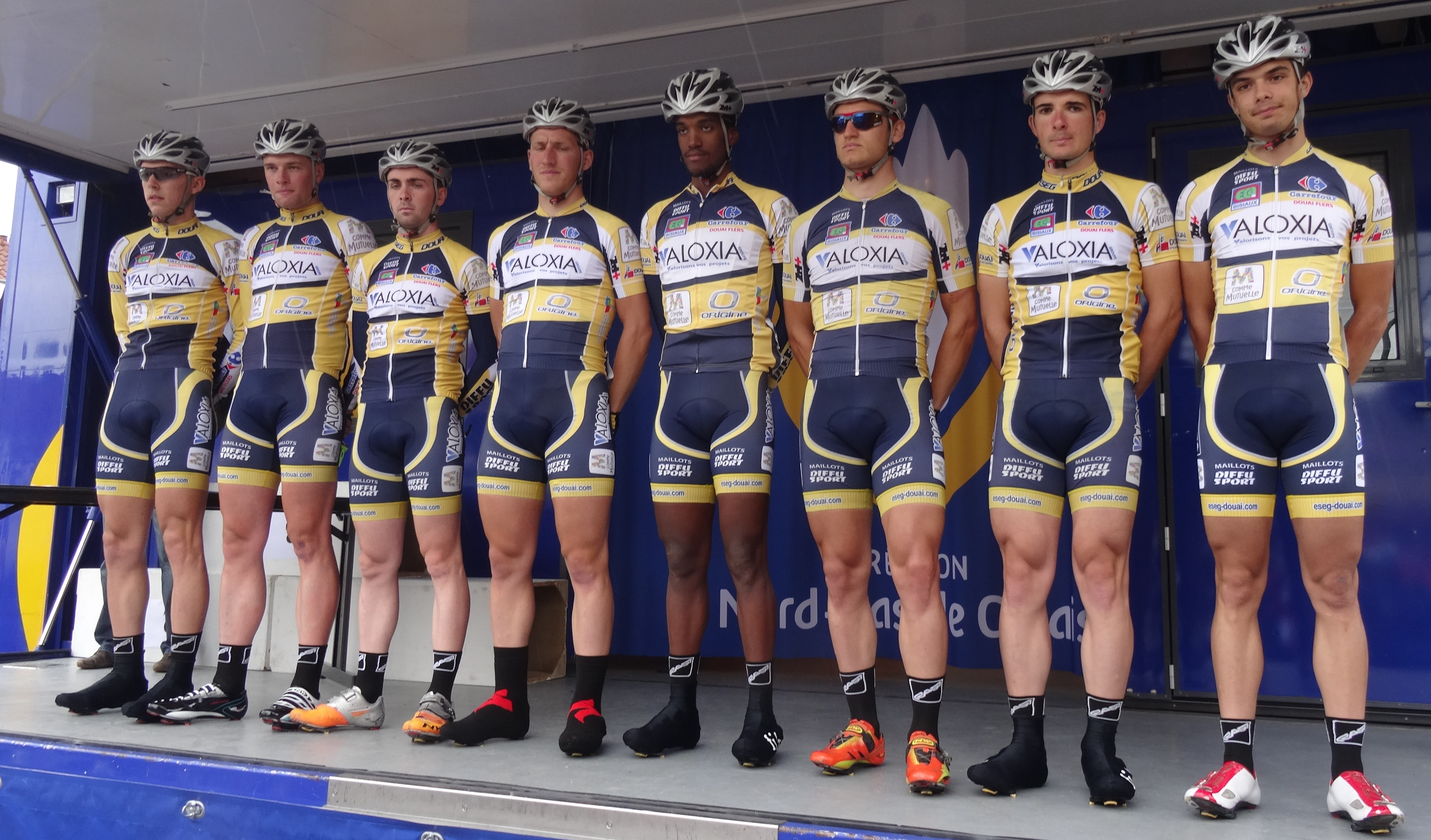 Reportage photographique réalisé le dimanche 13 juillet à l'occasion du départ et de l'arrivée de la Ronde pévéloise 2014 à Pont-à-Marcq, Nord-Pas-de-Calais, France.